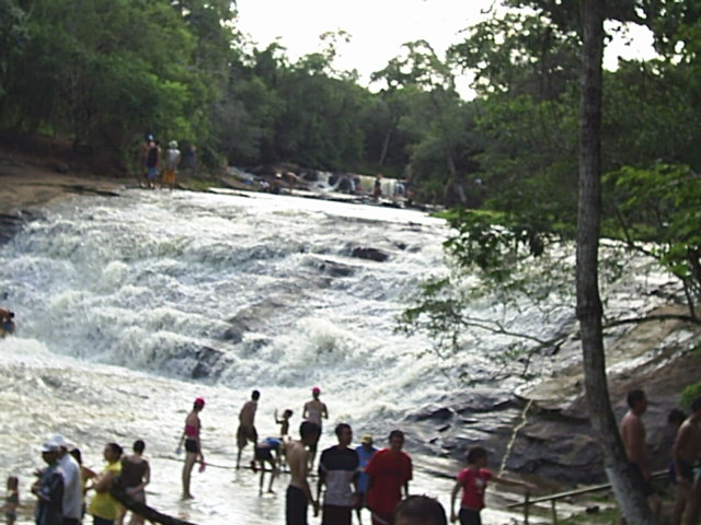 Caichoeira do Saltinho Localizada em Santana do Itararé - PR Foto por Marcelo André Malaquias